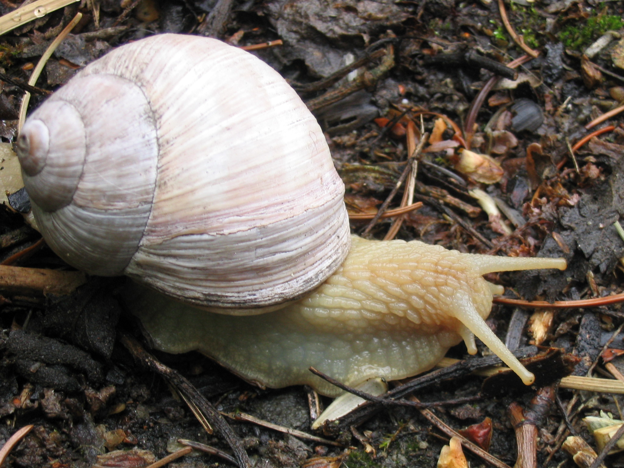 Helix pomatia, Weinbergschnecke, Wijngaardslak, Roman or Edible Snail Fotografiert: 23.04.2004, Dr. Hagen Graebner, Ingelheim/Rhein